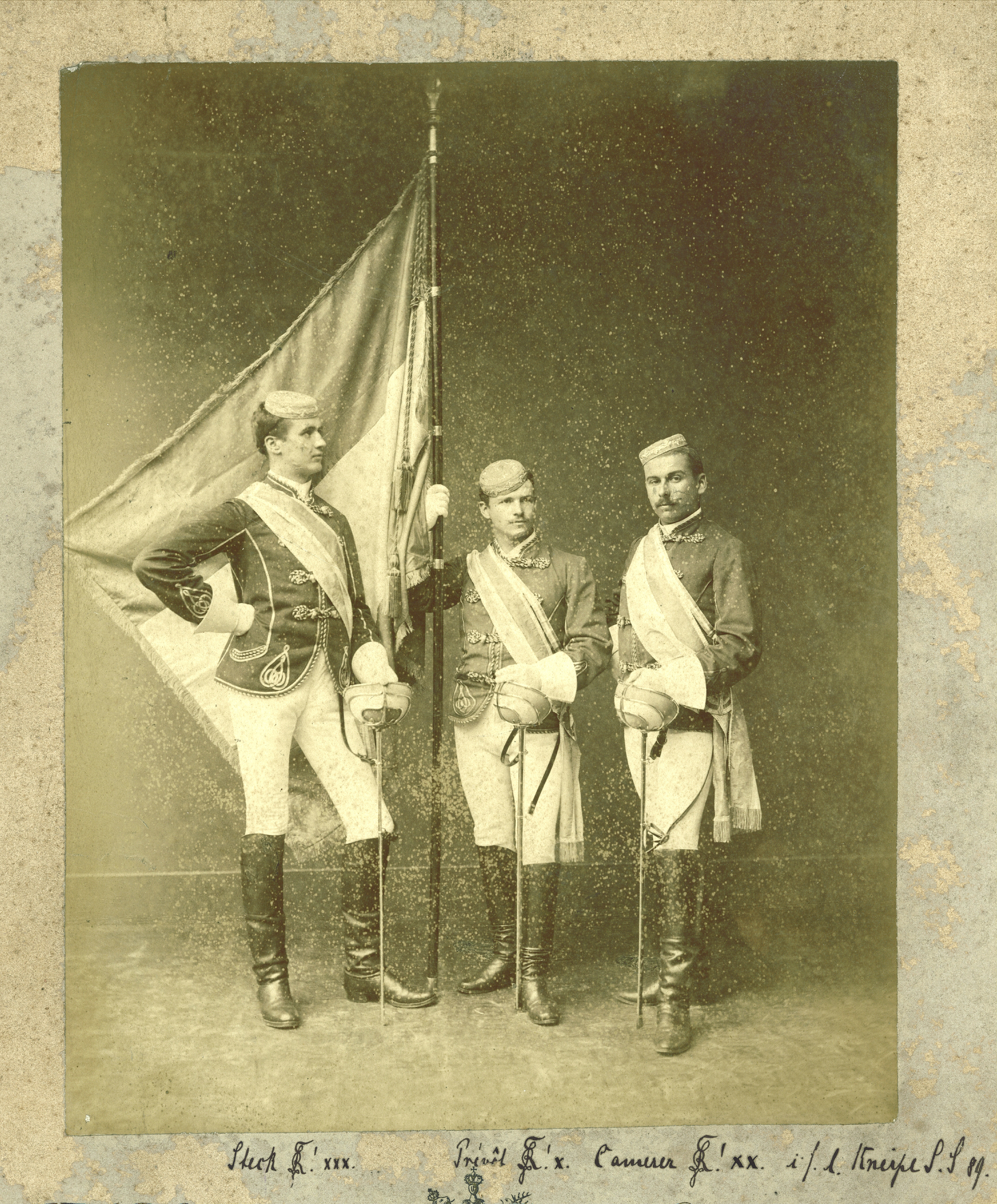 Chargierte 1896 Corps Rhenania Stuttgart